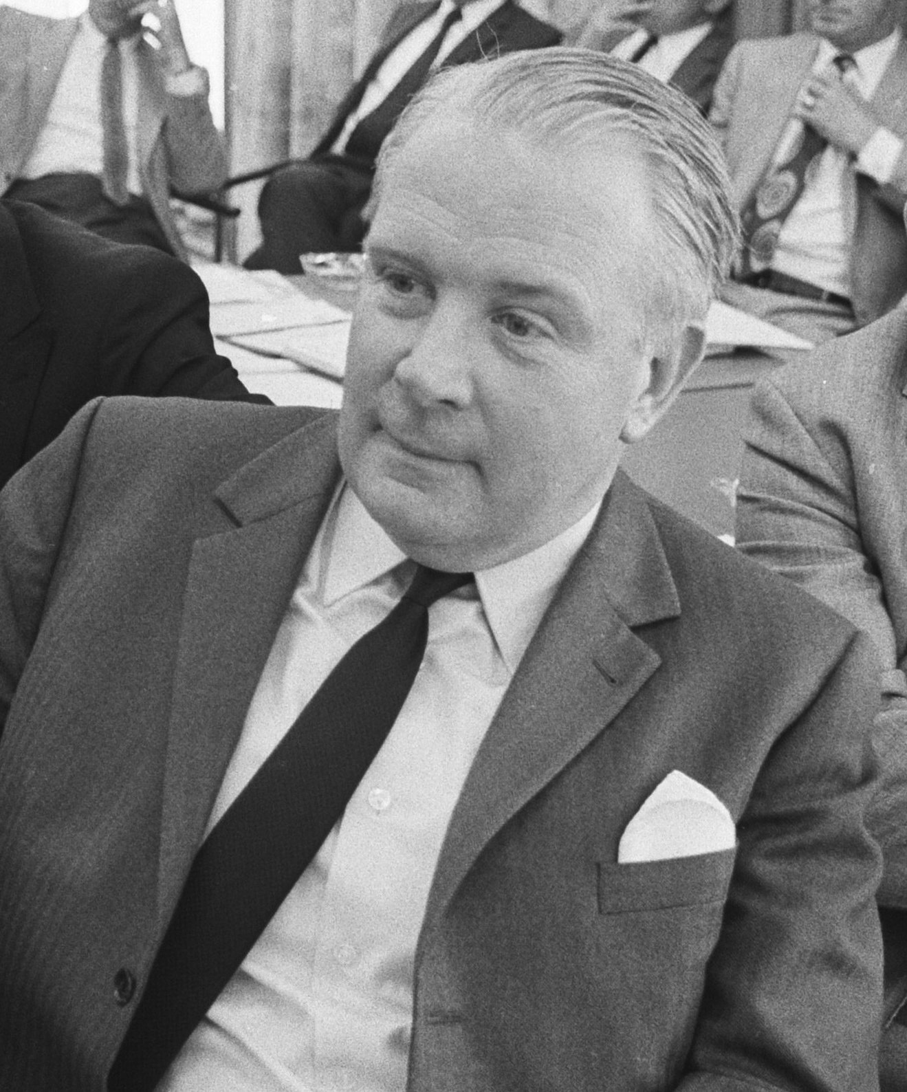 Buitengewone ledenvergadering KNVB, v.l.n.r. D. Stoop (DWS), Kaulenvleks (adviseur KNVB), Couwenberg (Feyenoord)